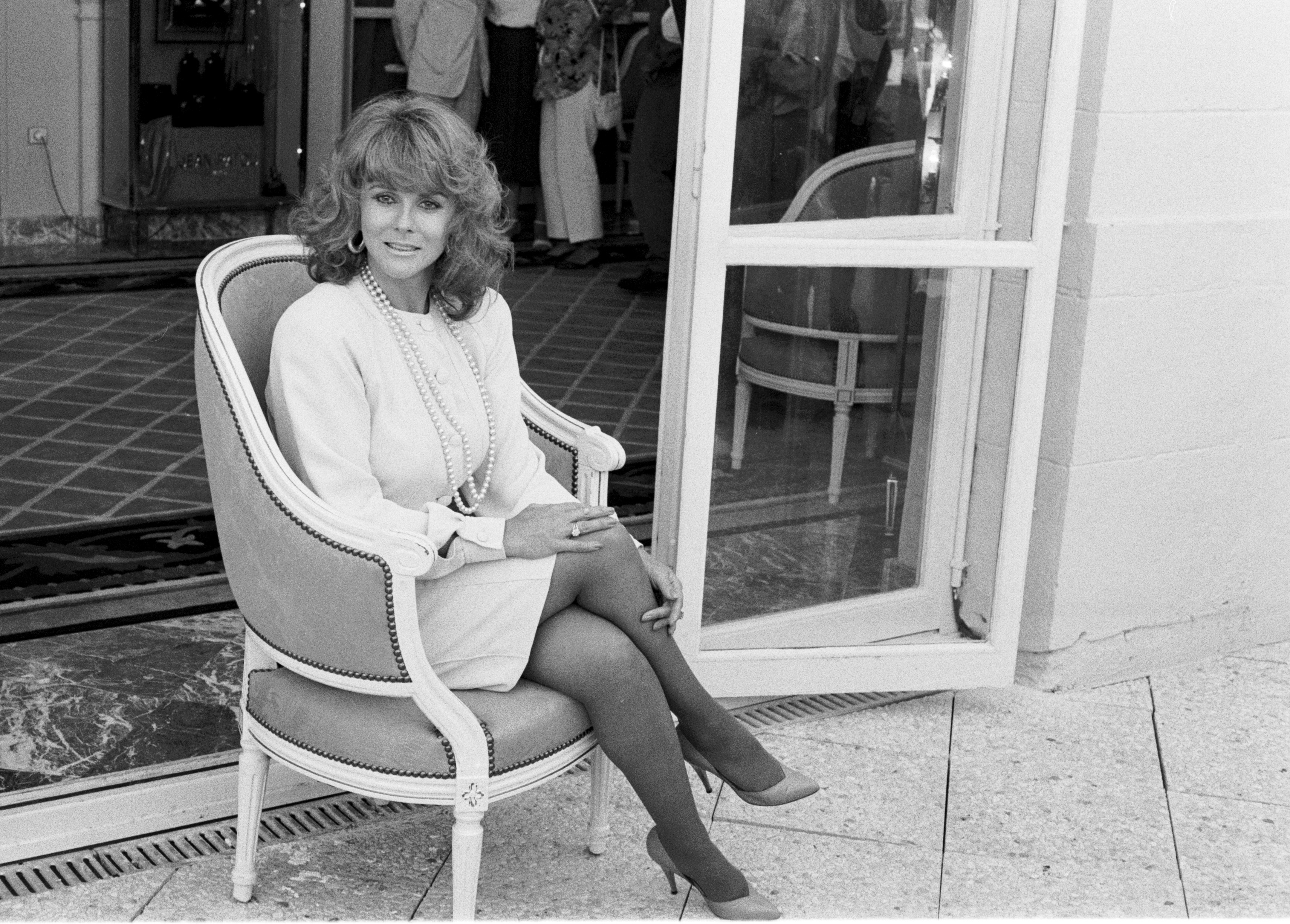 L'actrice américaine Ann-Margret au Festival du cinéma américain de Deauville (Normandie, France) en septembre 1988.